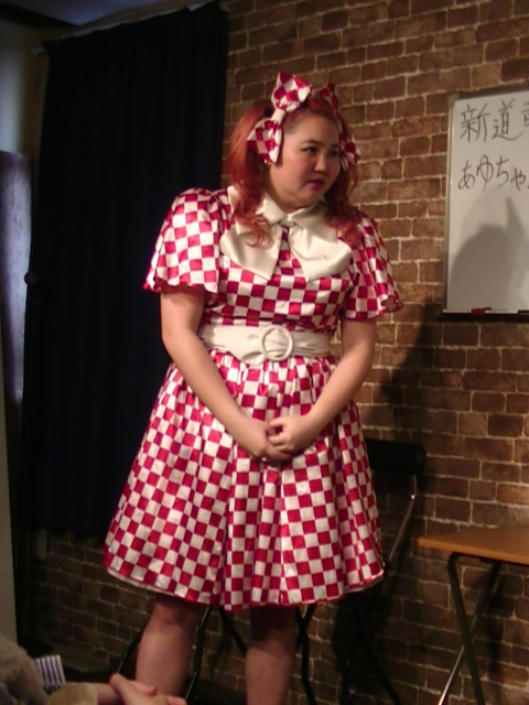 アユチャンネル (2018年3月4日)